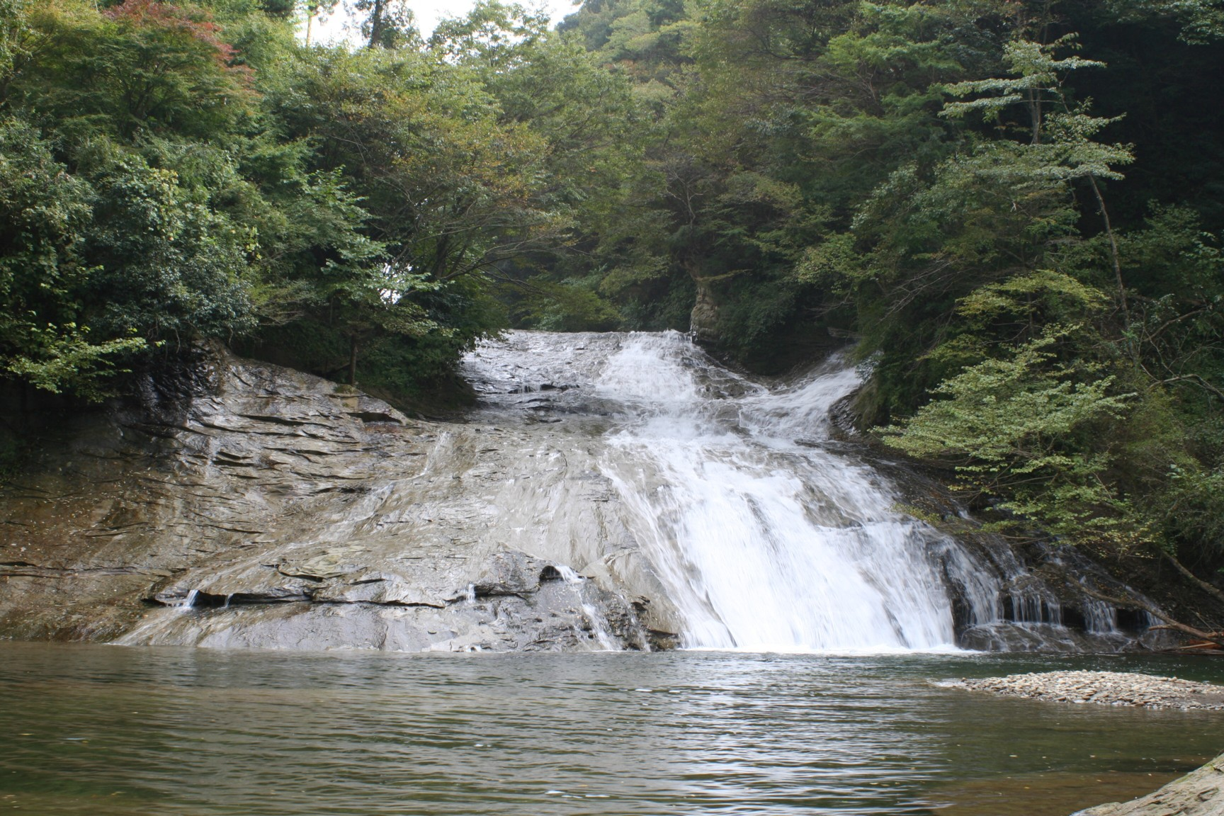 高滝